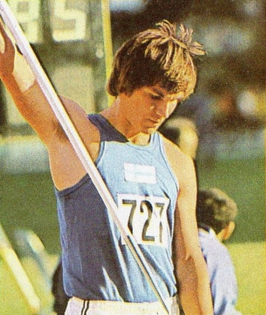 MUNCHEN/MONACO '72-PANINI-Figurina n.110- SIITONEN-FINLANDIA -ATLETICA LEGG.-Rec